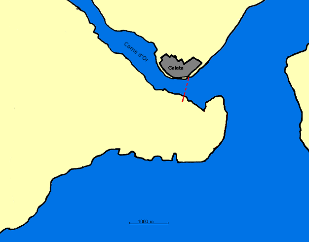 Carte de la Corne d'Or à Istanbul GFDL dessiné par user:dom à partir de la version allemande.